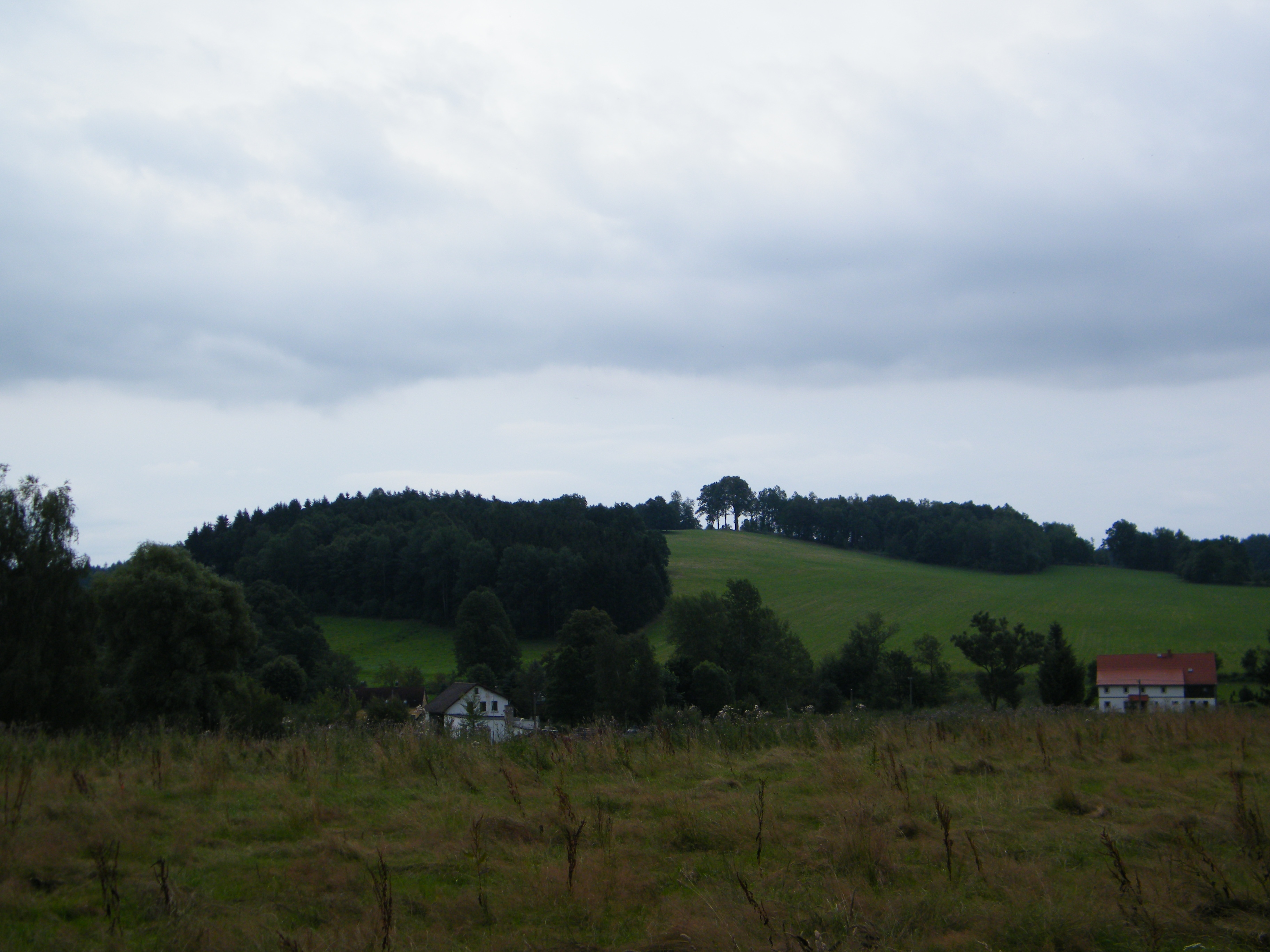 Anenský vrch od lobendavského hřbitova